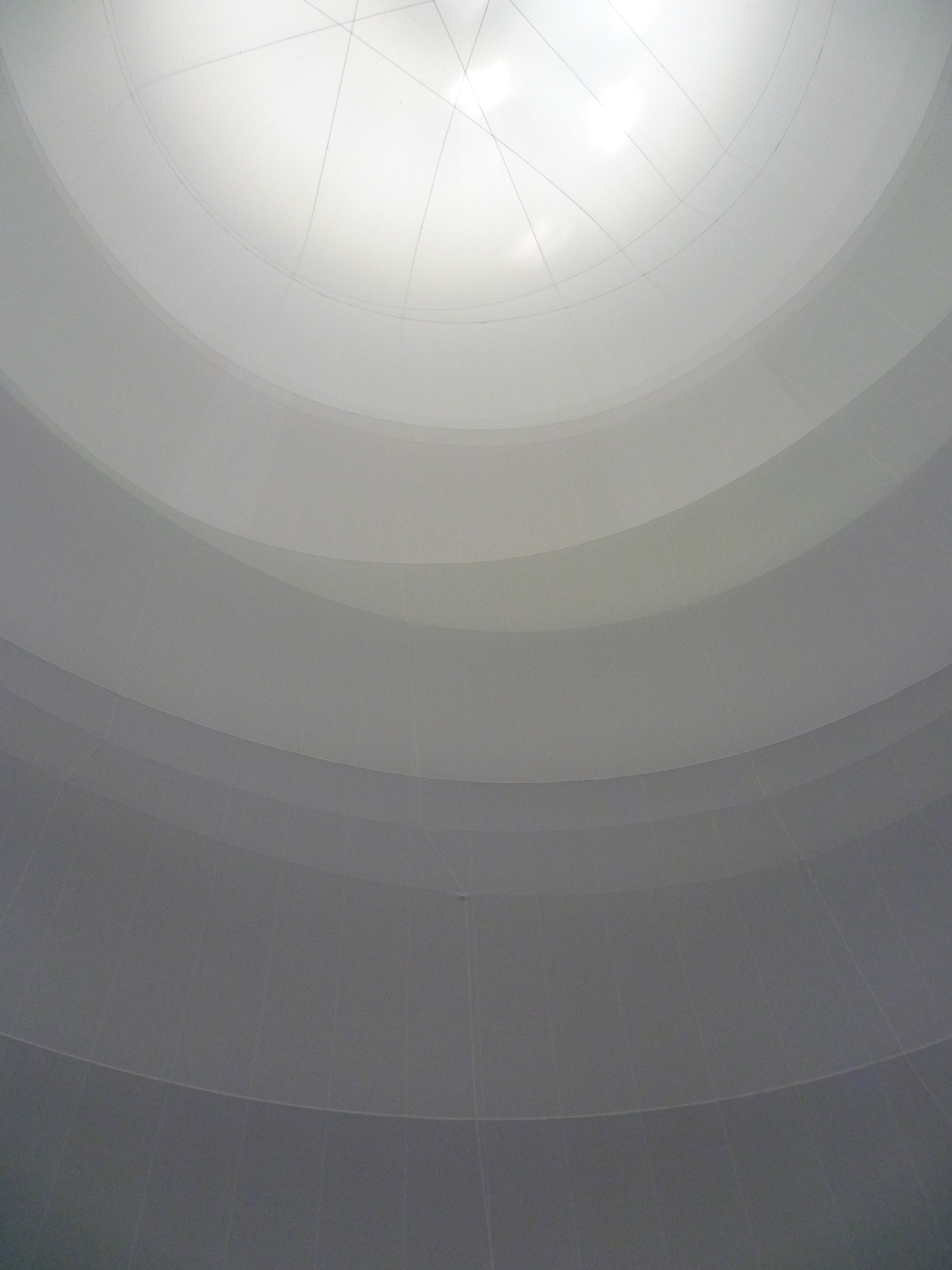 Blick im Big Air Package nach oben. Die außenliegenden Verpackungsschnüre erzeugen die Segmentierungen.